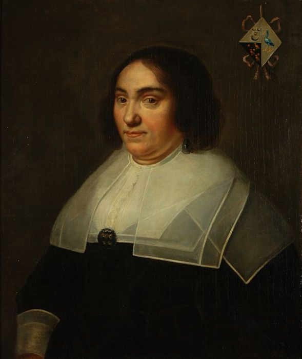 Portret van Maria van Reigersberch (de echtgenote van Hugo de Groot)